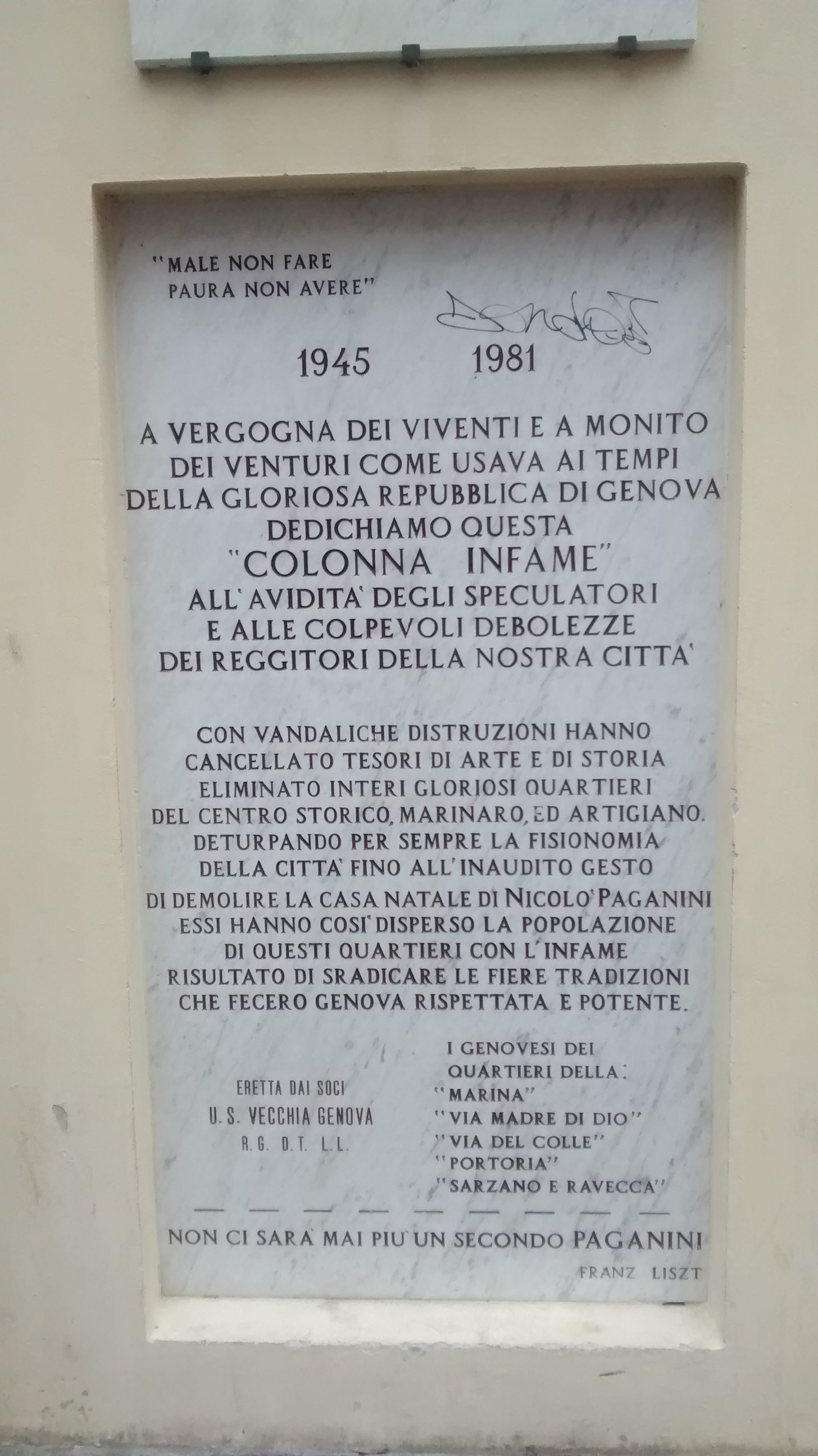 Targa che ricorda come, per far spazio al centro direzionale oggi sede della Regione Liguria, siano stati abbattuti diversi quartieri antichi e la casa natale di Niccolo' Paganini